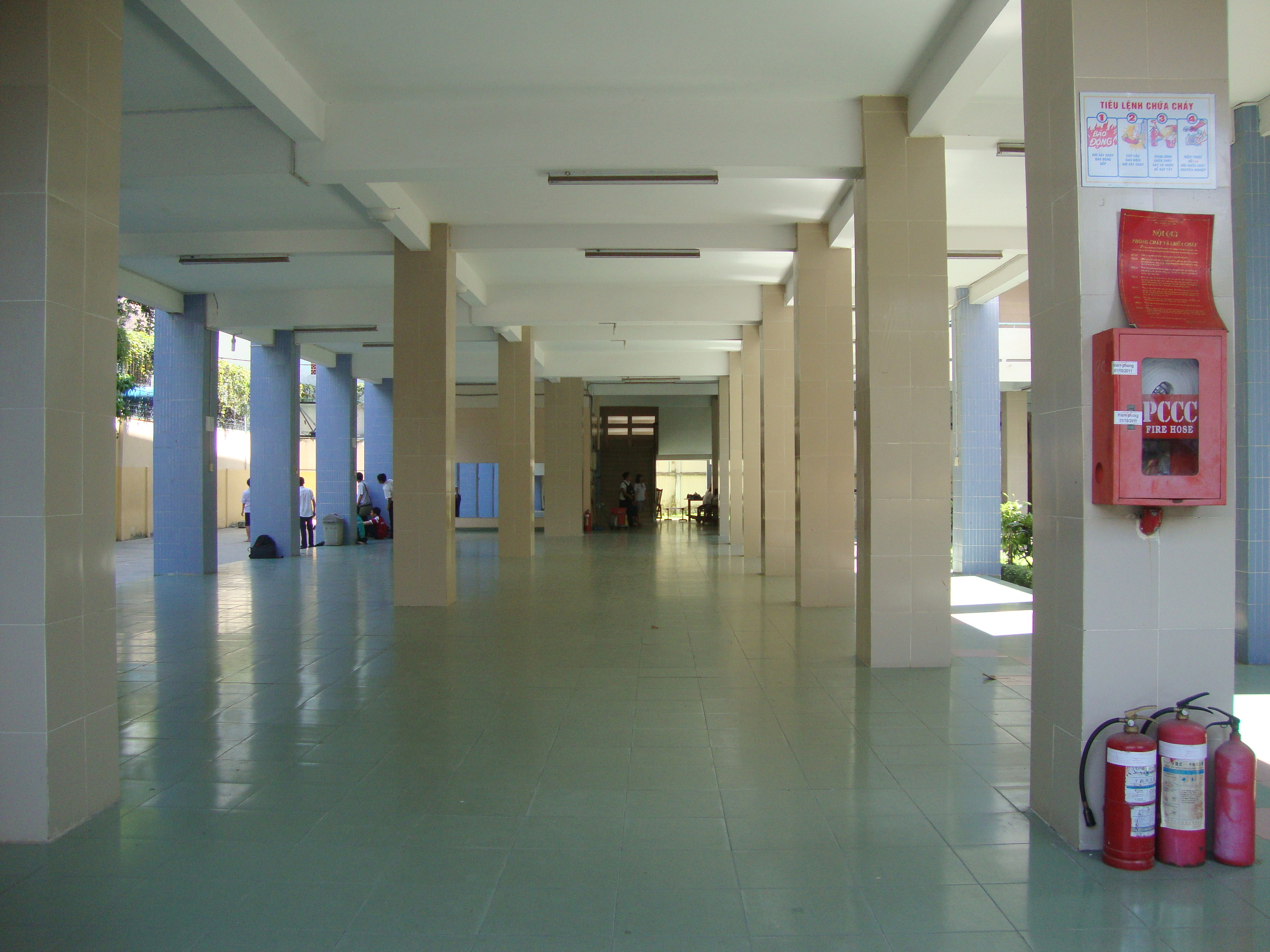 Sảnh D, THPT Trần Phú TP.HCM